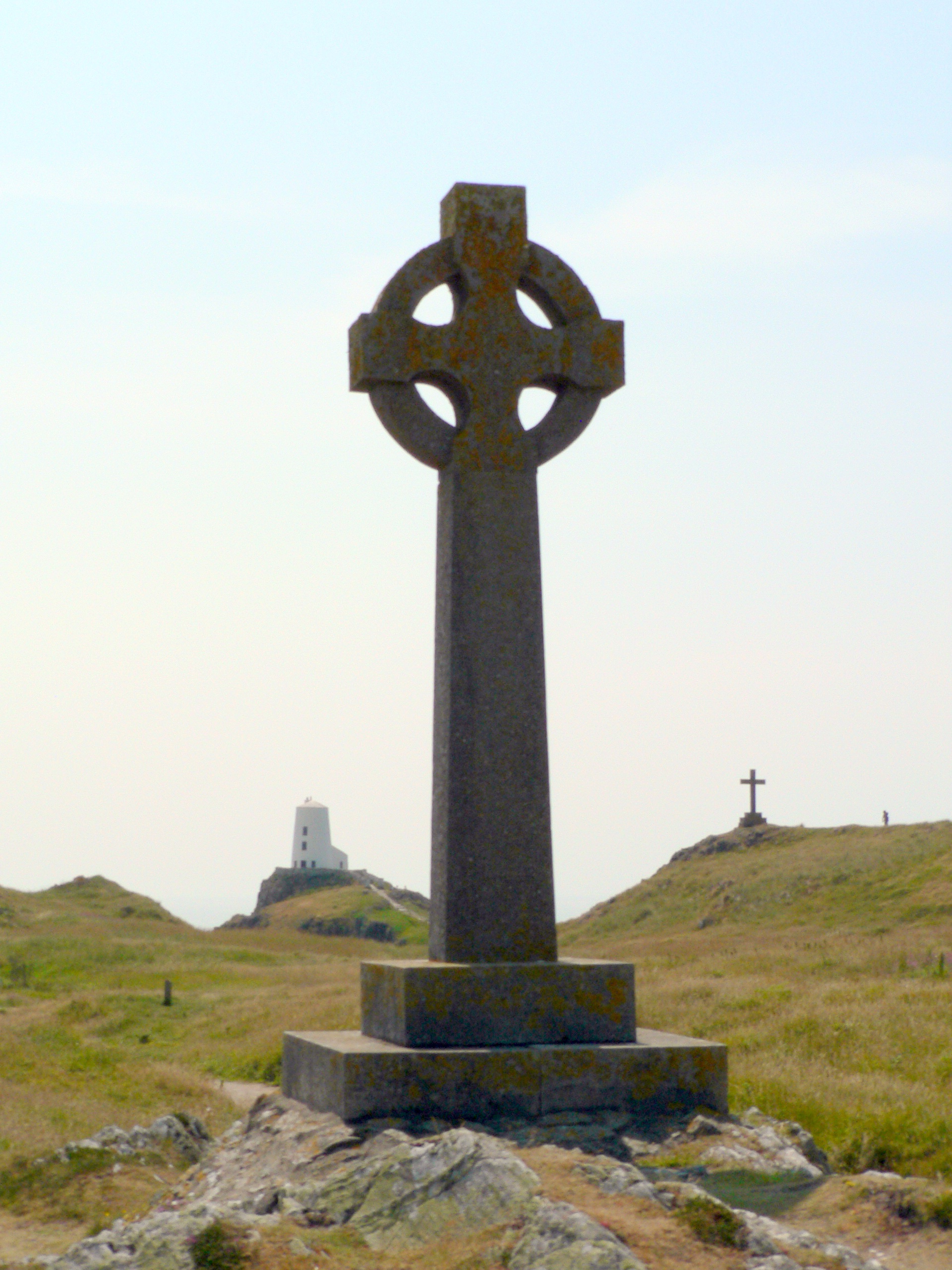 Crosses On Llanddwyn Island